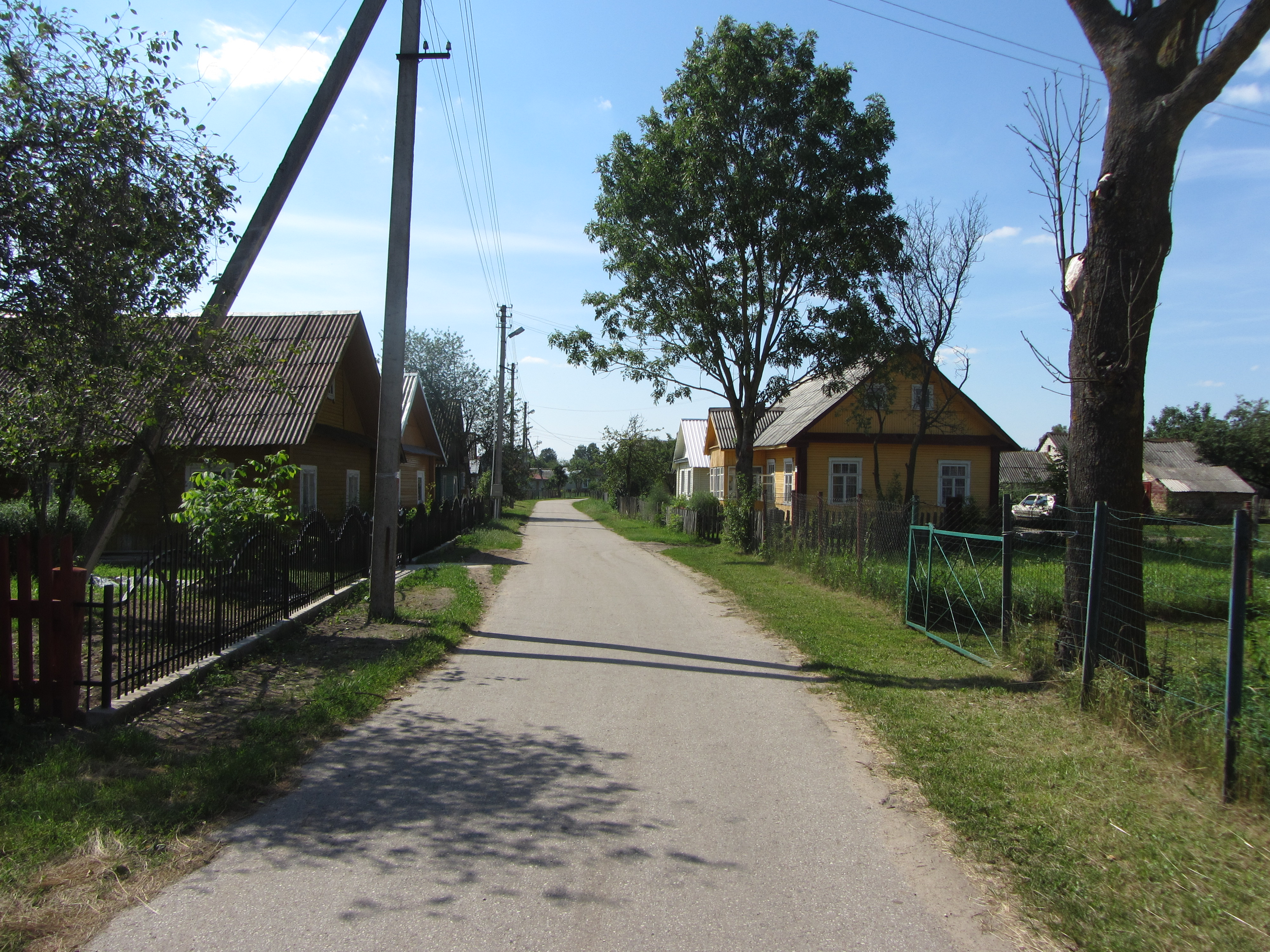 Dubičiai, Lithuania